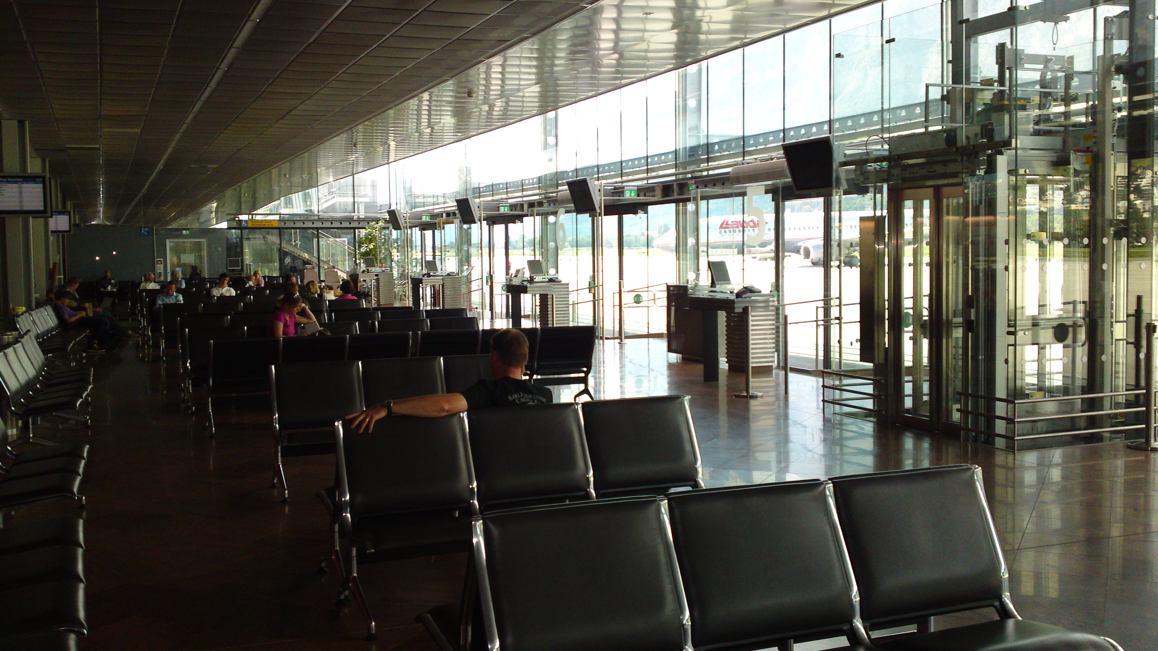 Innsbruck Flughafengebäude und Tower von der Straßenseite. Innsbruck, Tirol, Österreich.